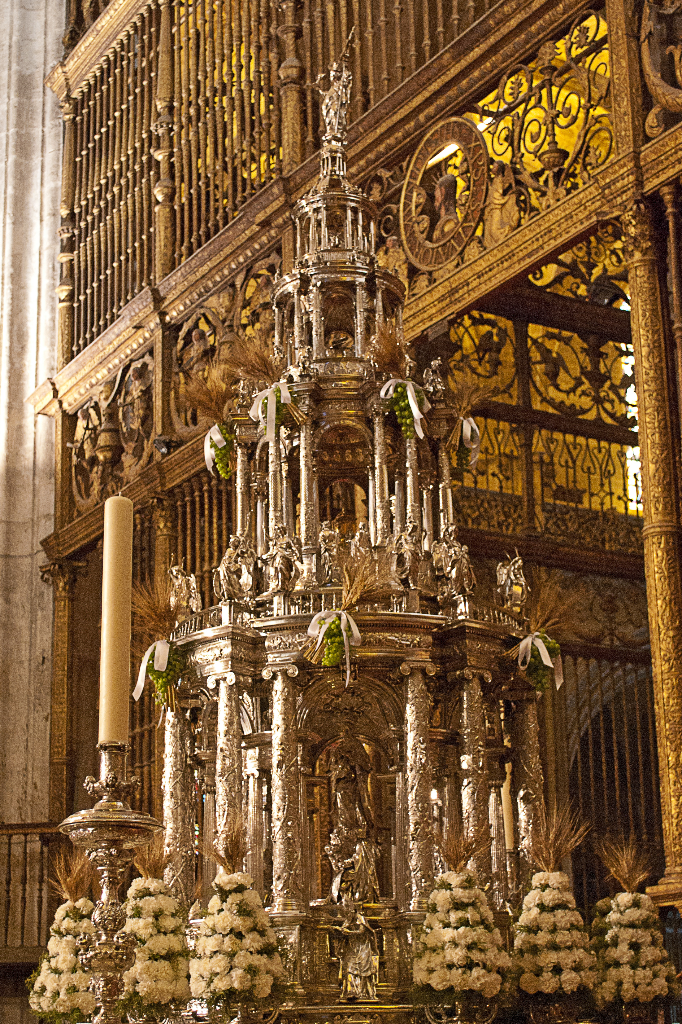 Custodia de Juan de Arfe (Catedral de Sevilla).